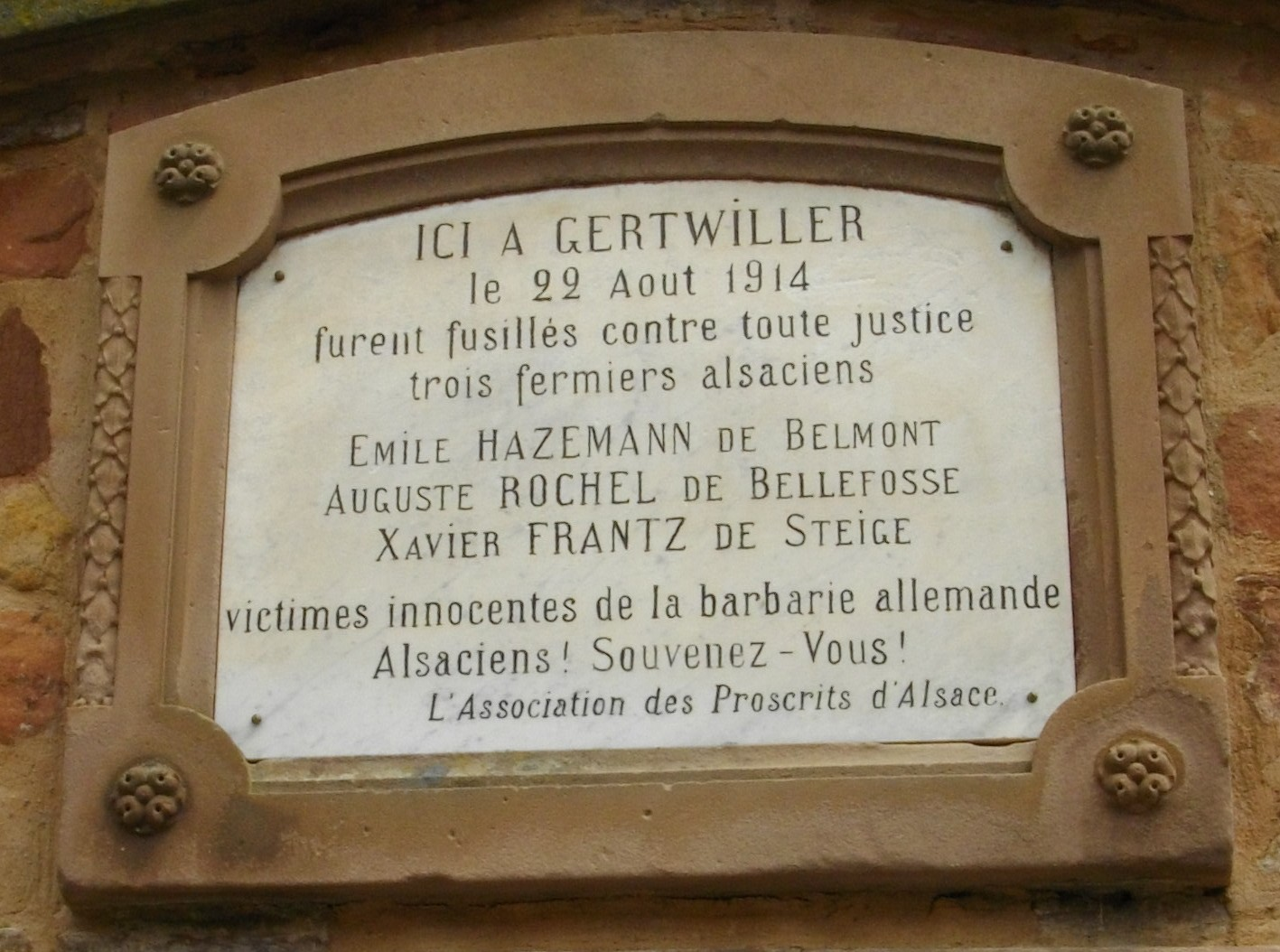 Plaque apposée en mémoire de trois fermiers alsaciens fusillés par les forces armées allemandes en 1914.